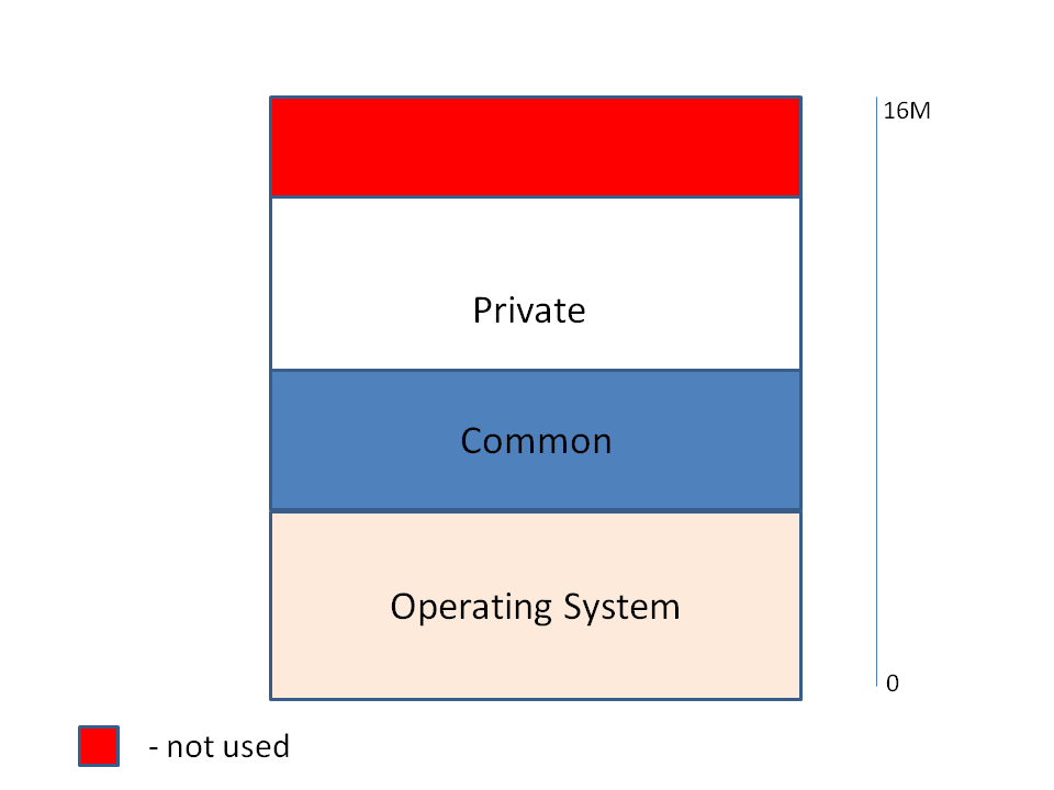 MVS. מבנה סכמטי של הזיכרון הוירטואלי של עבודה במערכת ההפעלה Scheematic structure of address space Virtual Storage in MVS Operating System